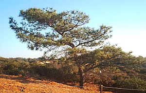 Pinus torreyana (Torrey Pine)